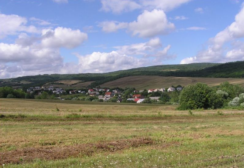 Celkový pohľad